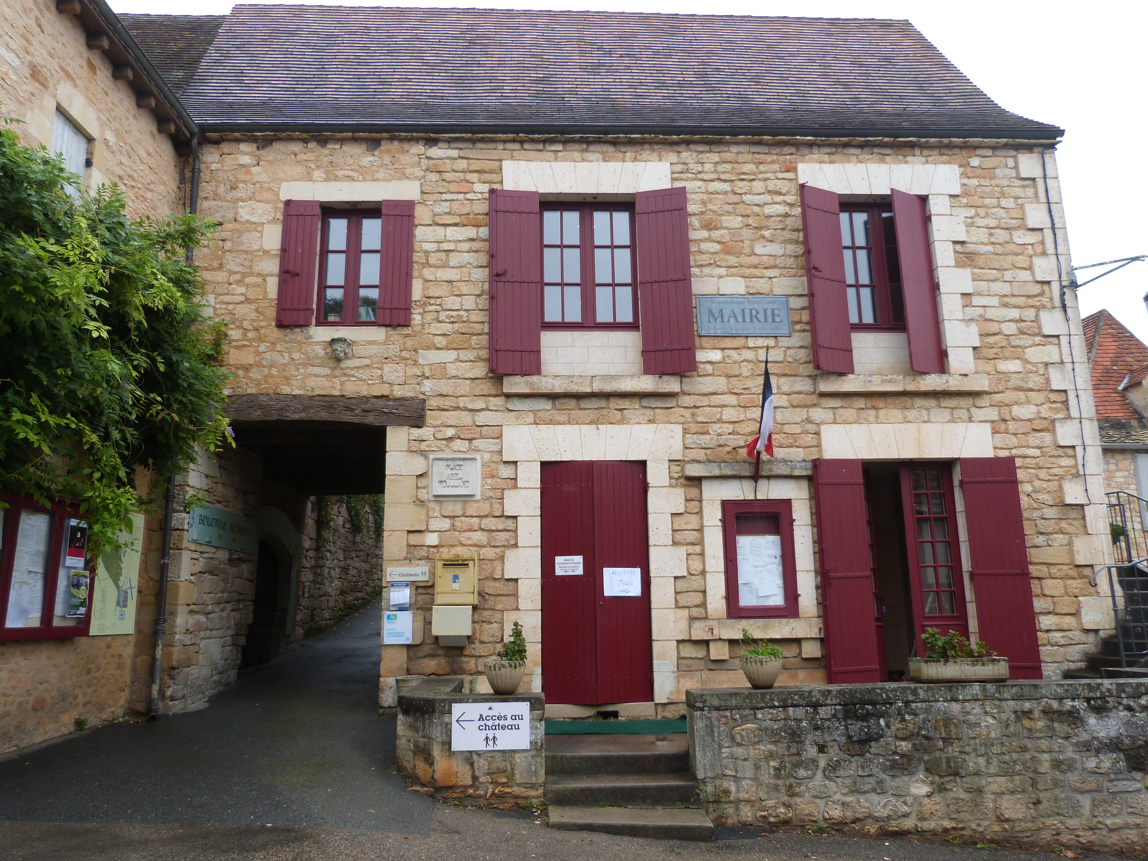 Mairie de Castelnaud-la-Chapelle (Dordogne)